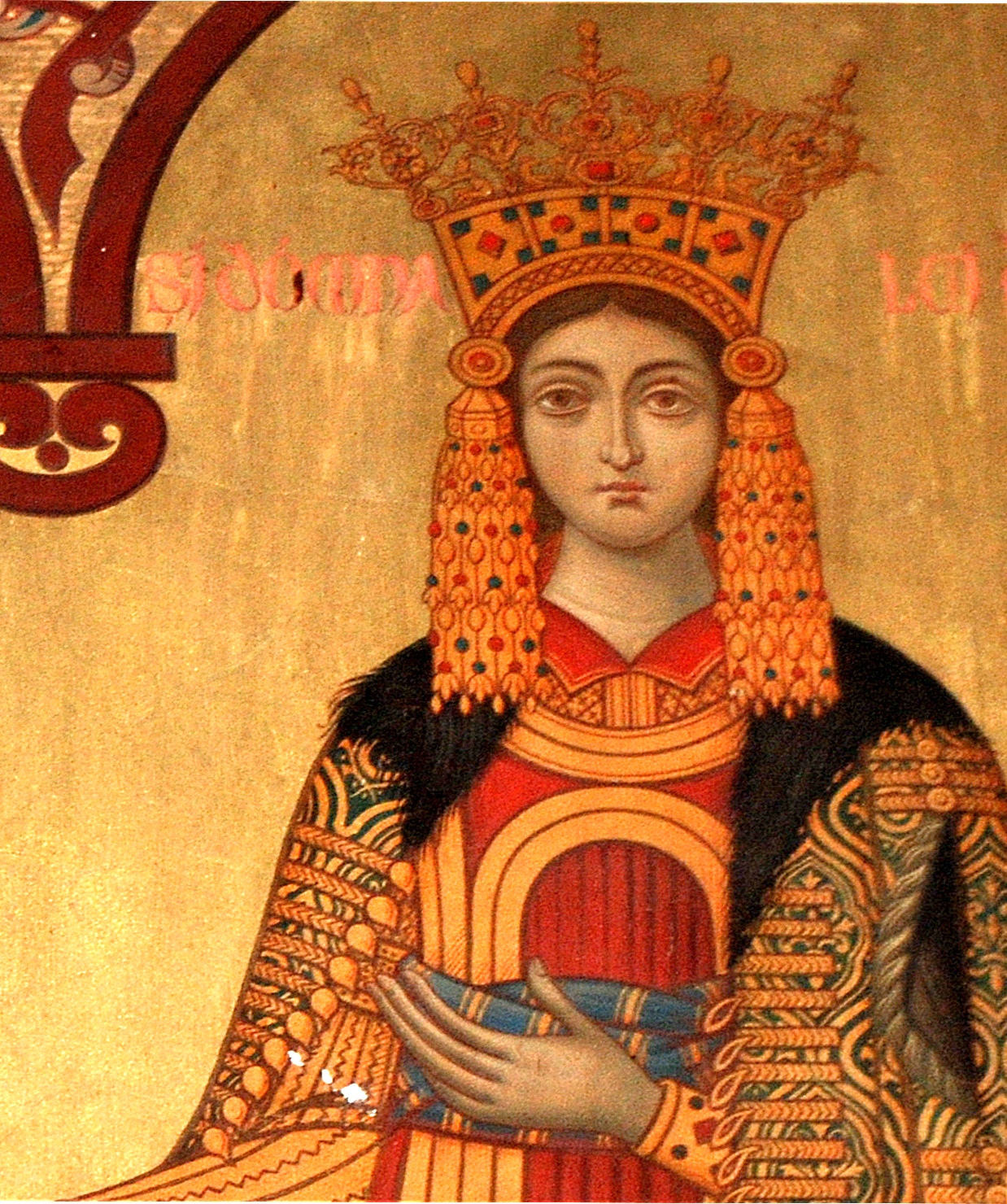 Milita Despina in tabloul votiv de la Curtea de Arges